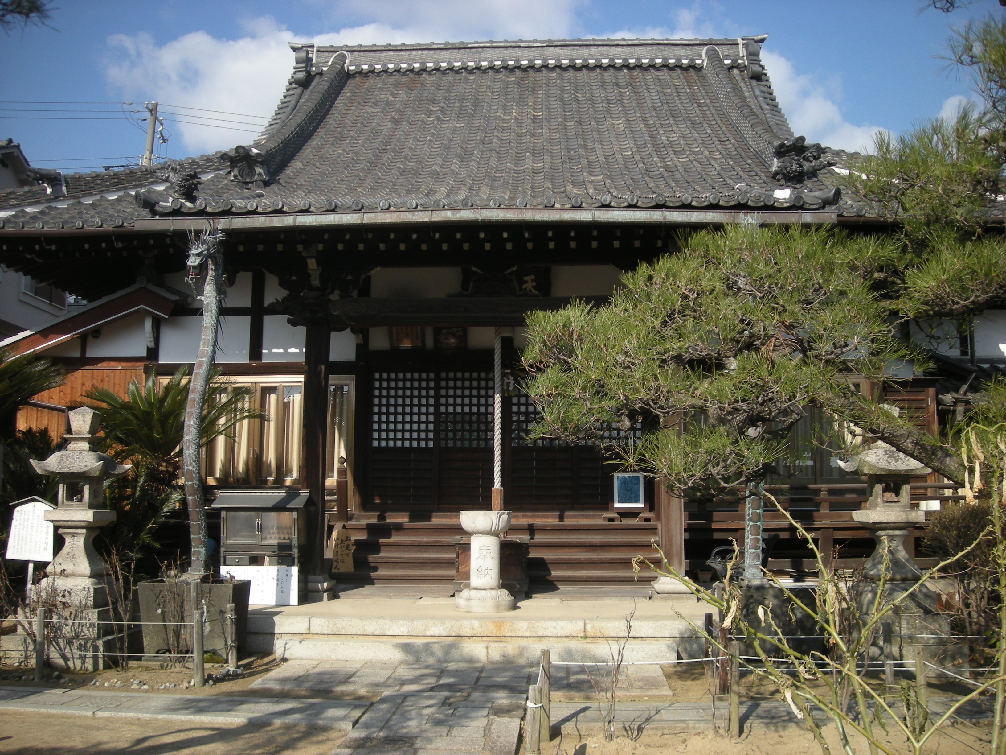 天照山明泉寺 本堂